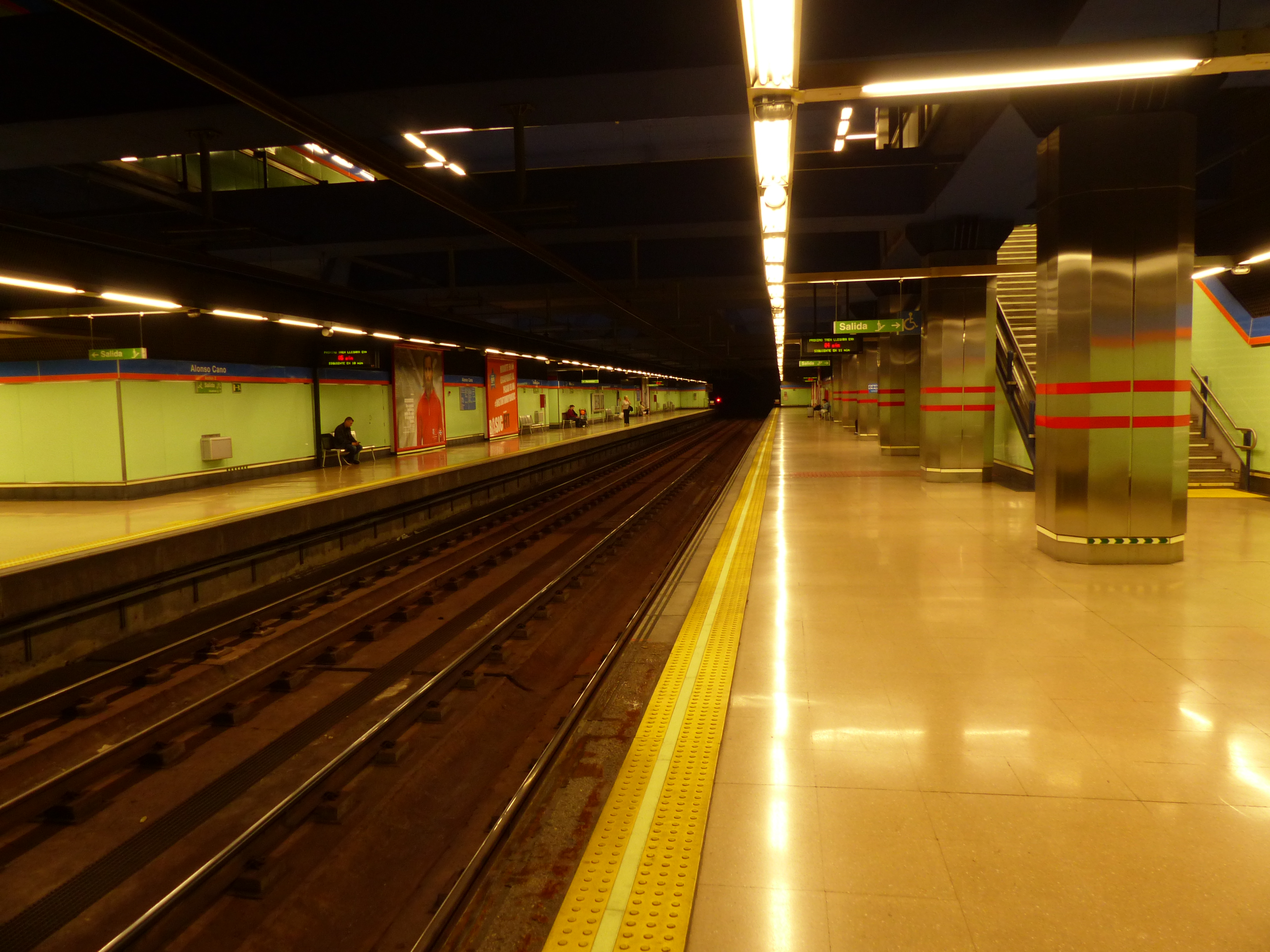 Estación de Alonso Cano, uno de los andenes.